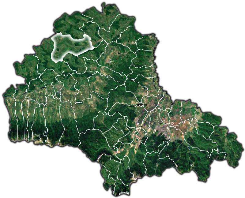 Jibert jud Brasov